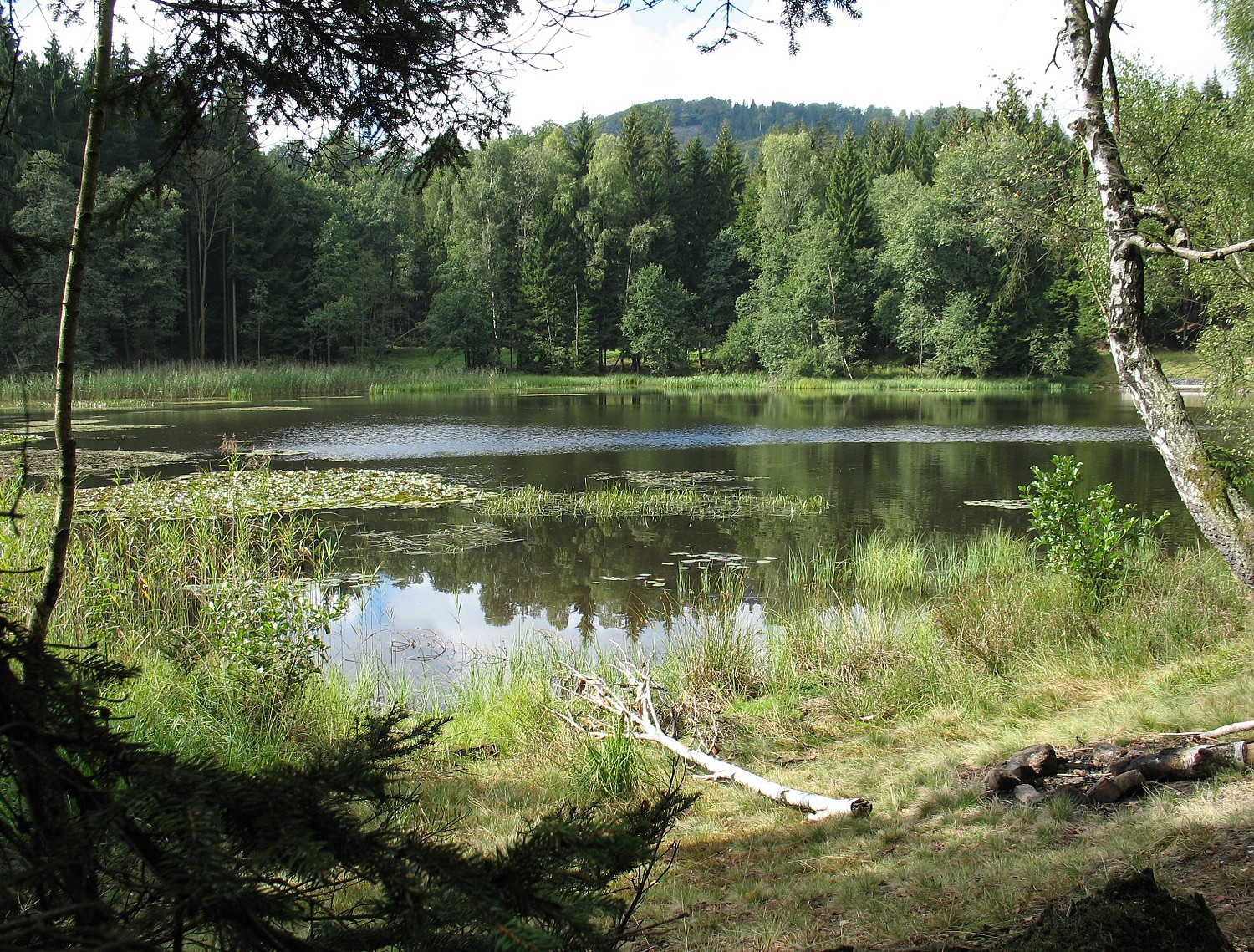 Velký Jedlovský rybník v Lužických horách